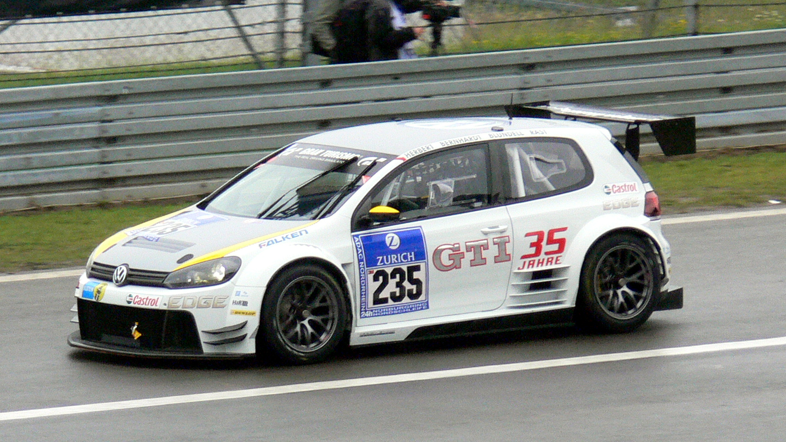 VW Golf 24 beim 24h-Rennen auf dem Nürburgring